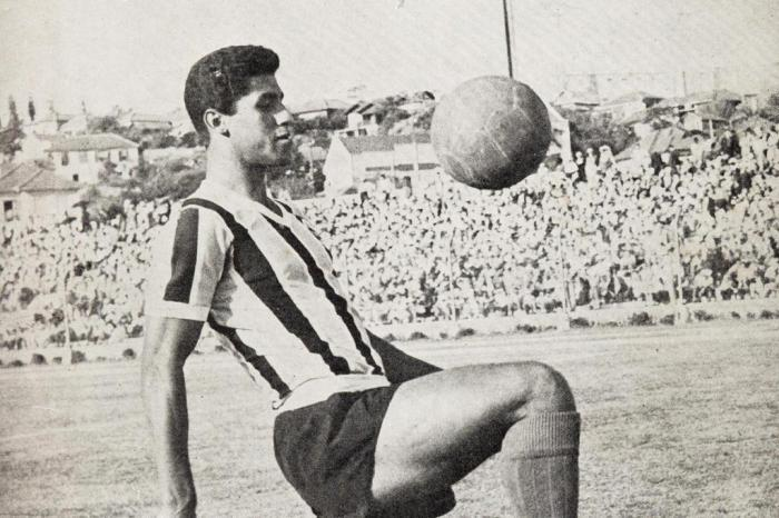 Zagueiro histórico do Grêmio FBPA.